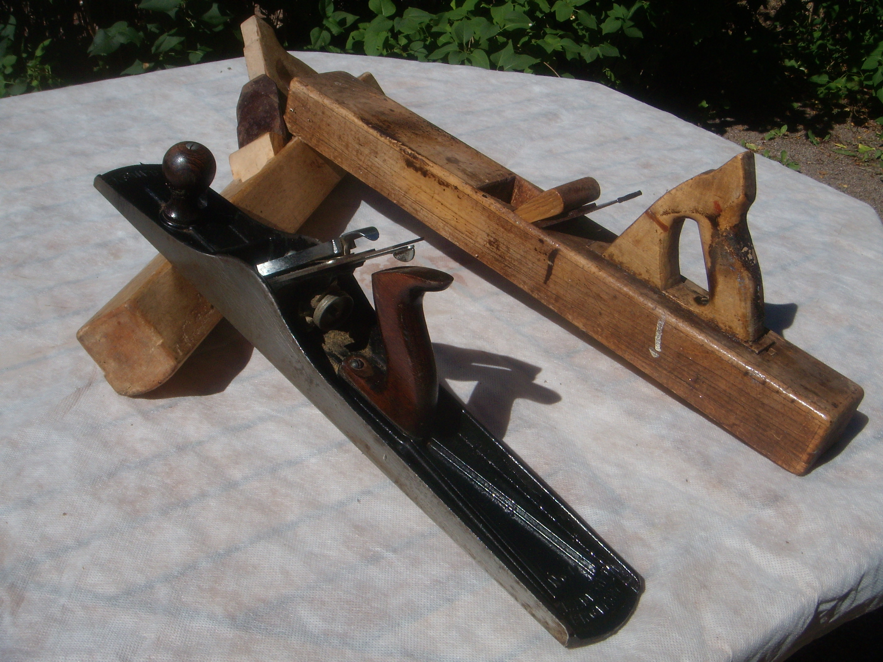 Rubank